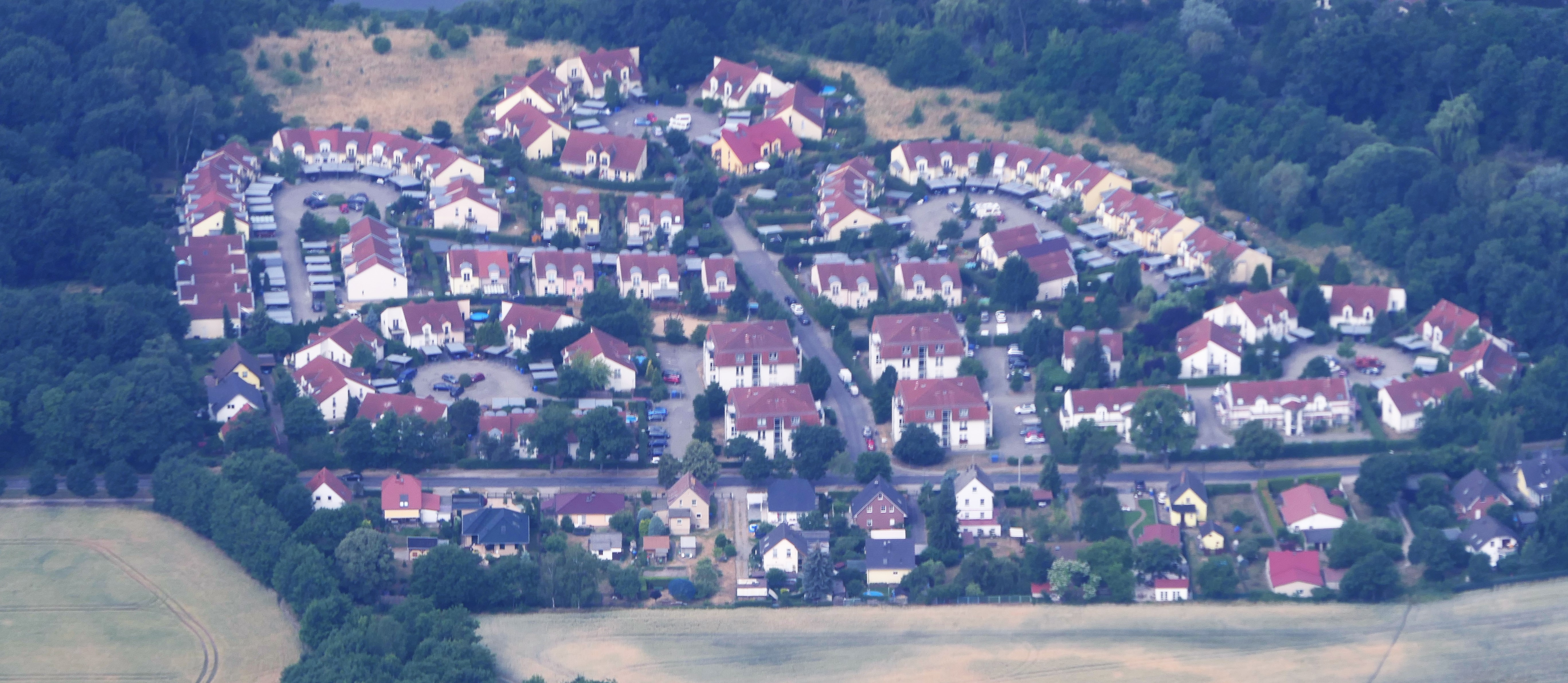 Blick von Osten auf Hönow-Nord in Brandenburg